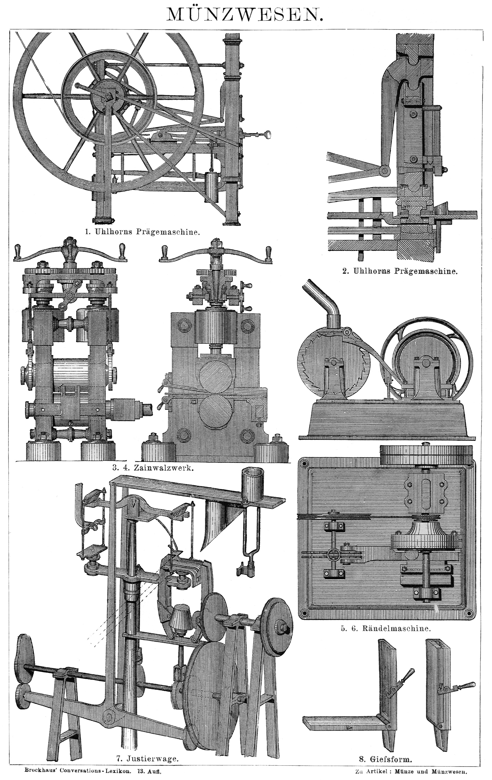 Münzprägewerke. Tafel aus Brockhaus, Artikel Münzwesen. Brockhaus' Conversations-Lexikon, 11. Band. 13.Auflage Leipzig 1885, Seite 942f. Mint machinery.